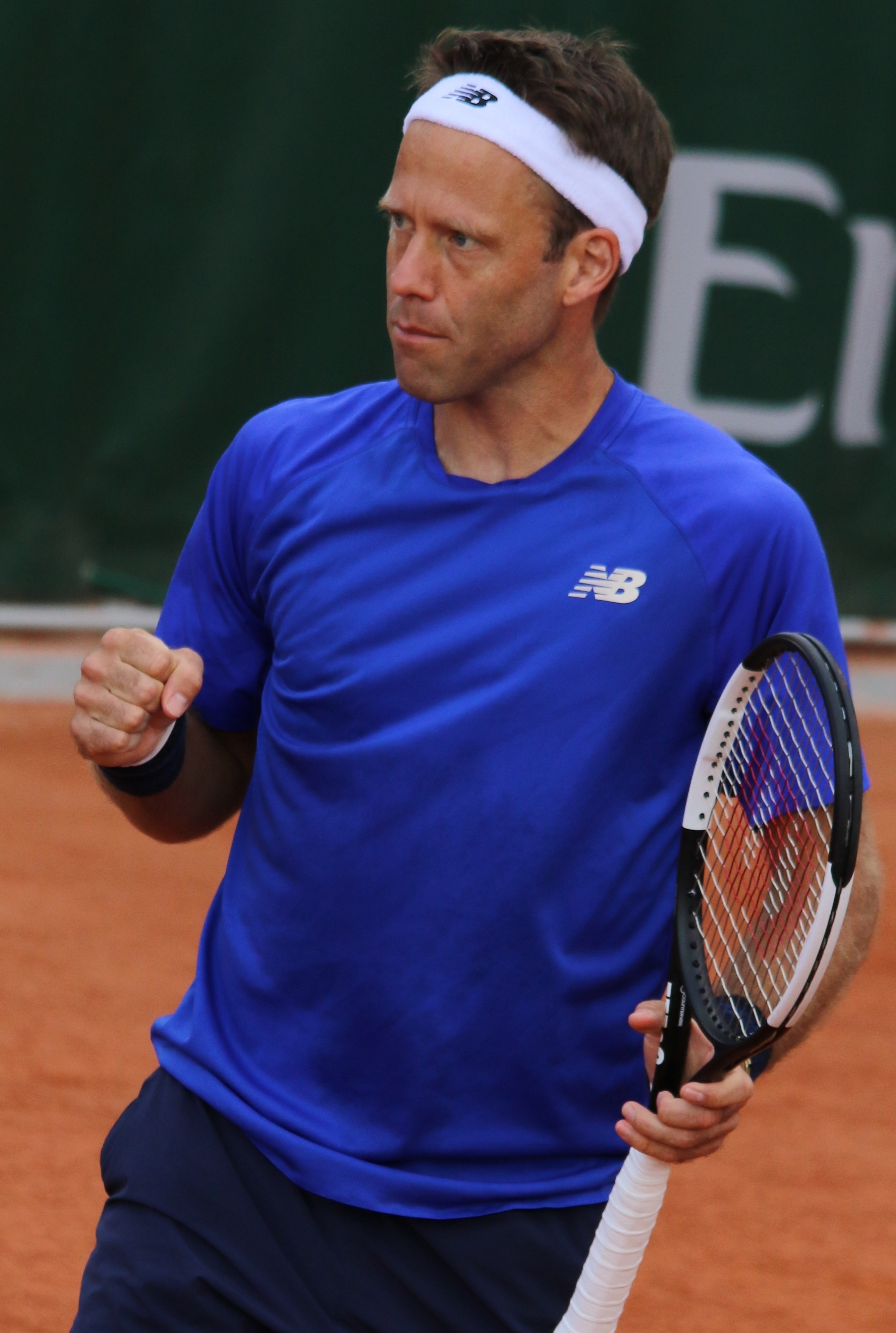 Lindstedt RG19 (6)